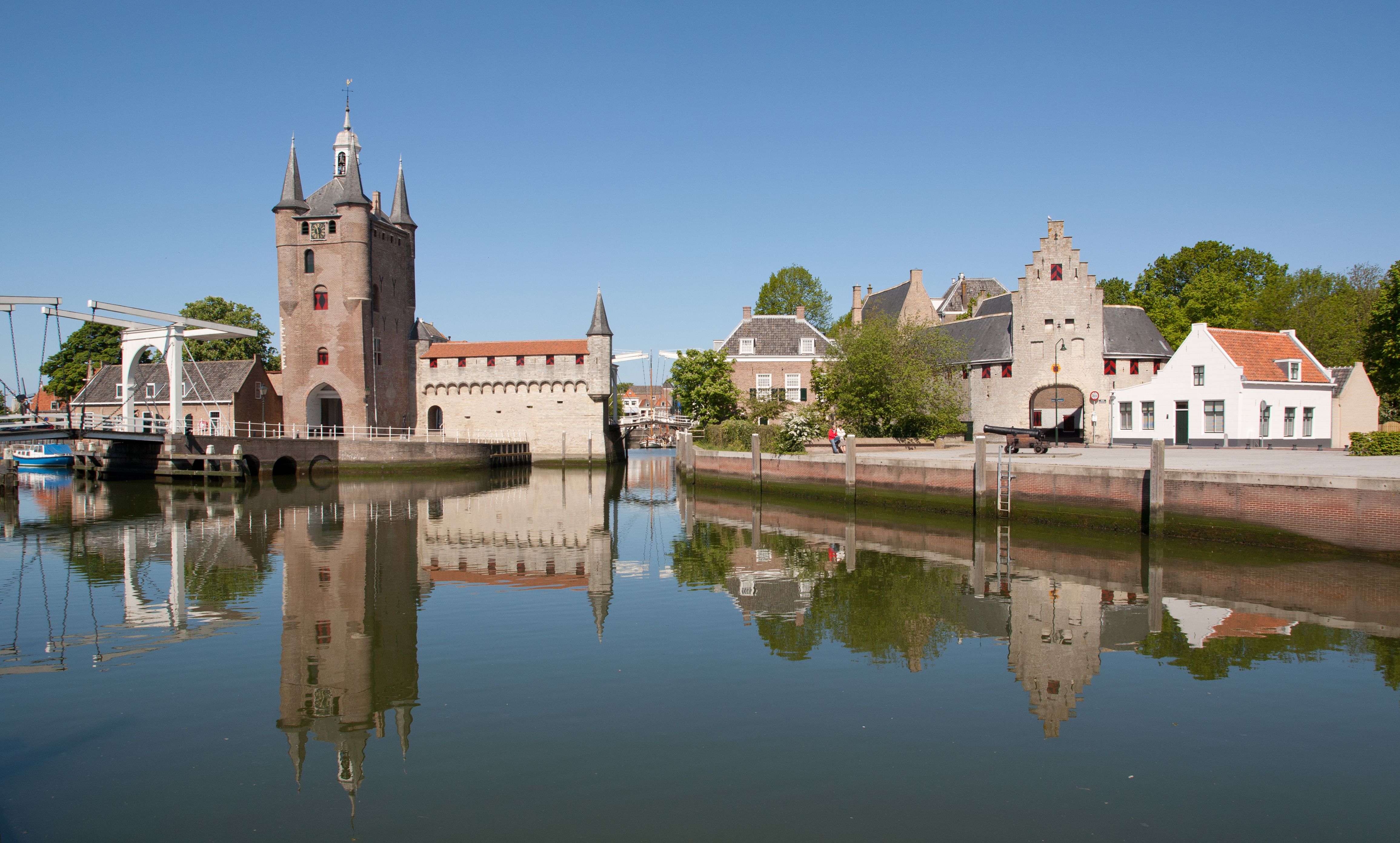 De ingang van de oude haven van Zierikzee met de Noord- en Zuidhavenpoort